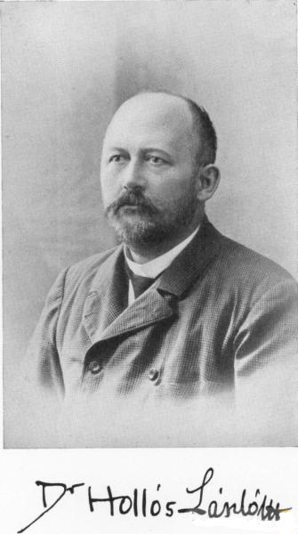 Hollós László, 1881-ig Schwarzkopf László (Szekszárd, 1859. június 18. – Szekszárd, 1940. február 16.) botanikus, mikológus.